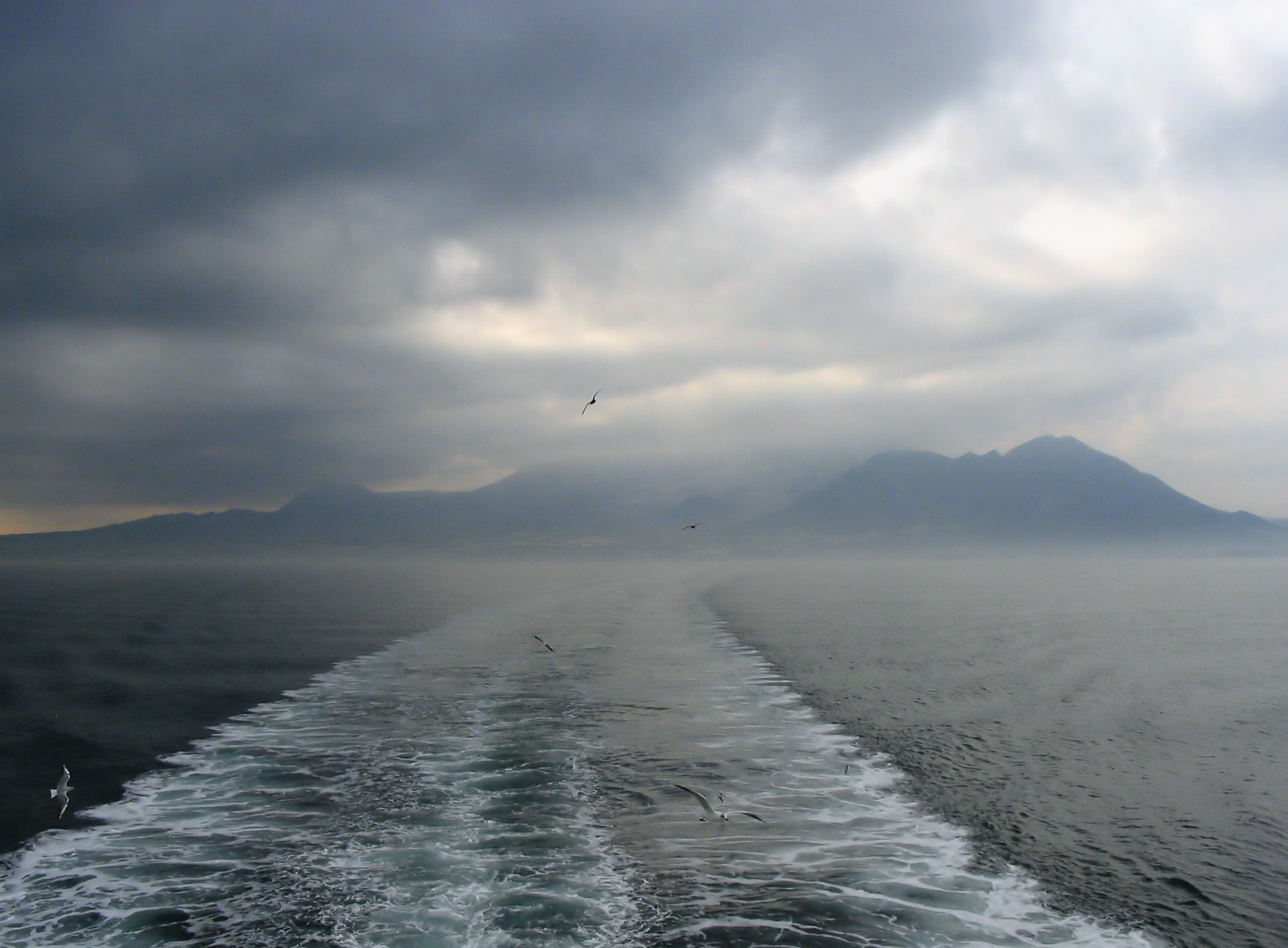 Shimabara hanto in clouds 2